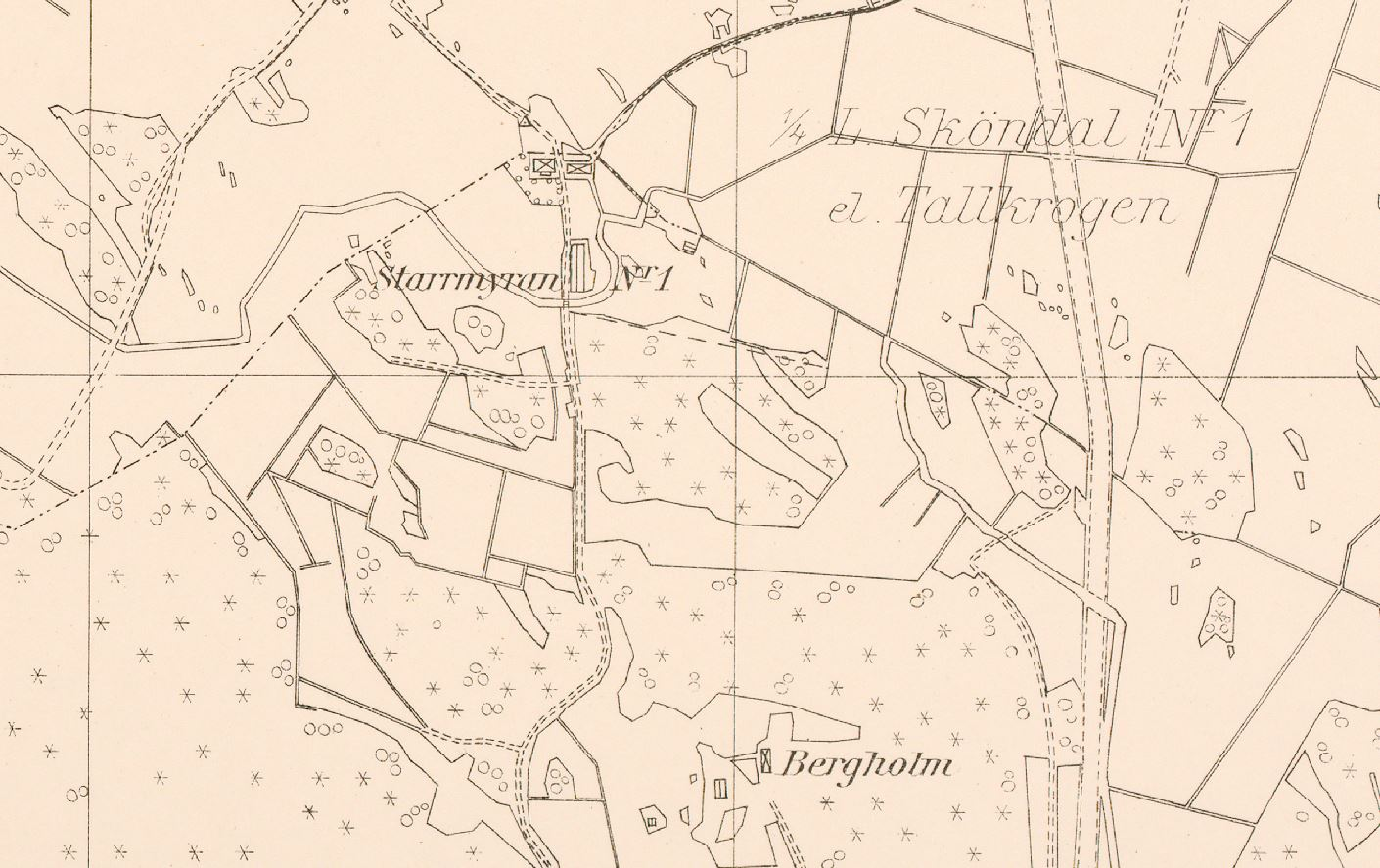 Torpet Starrmyra Torpet Lugnet i Hökarängen på 1926 års karta över Brännkyrka del 14 (Gubbängen, Tallkrogen, Herrängen och Örby)